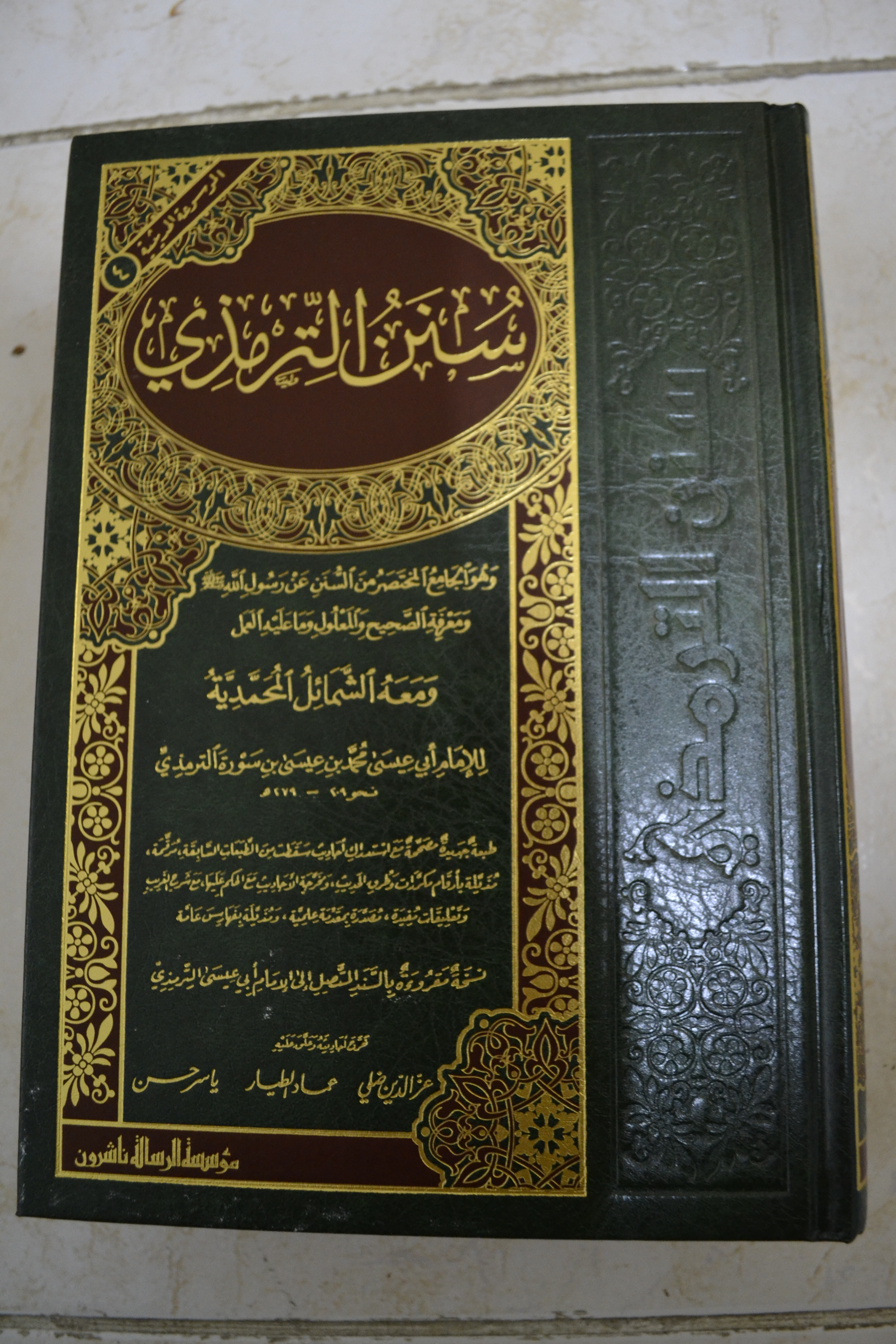 Kitab ini ditulis oleh Imam at-Tirmidzi